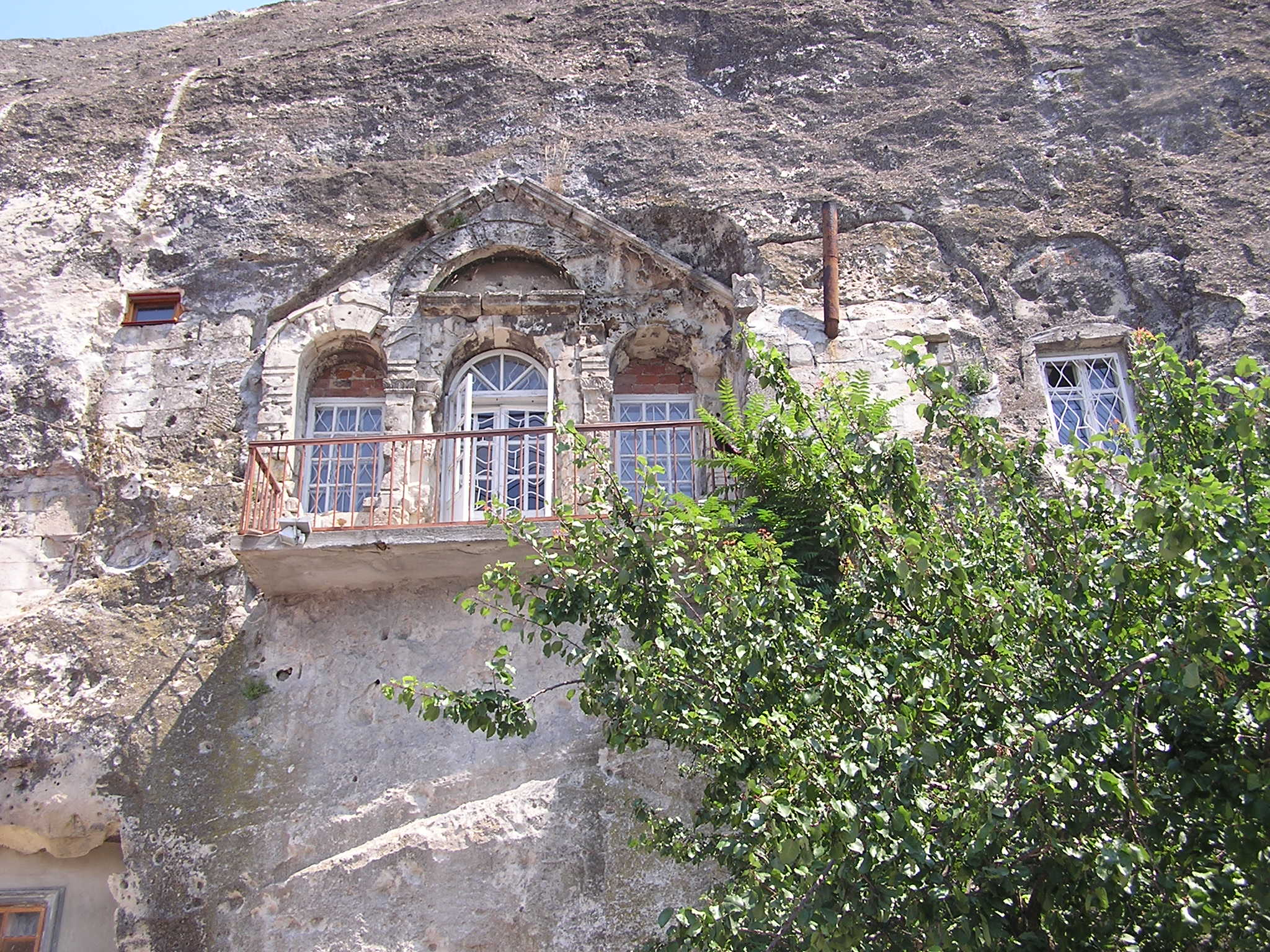 Инкерман. Свято-Климентовский монастырь